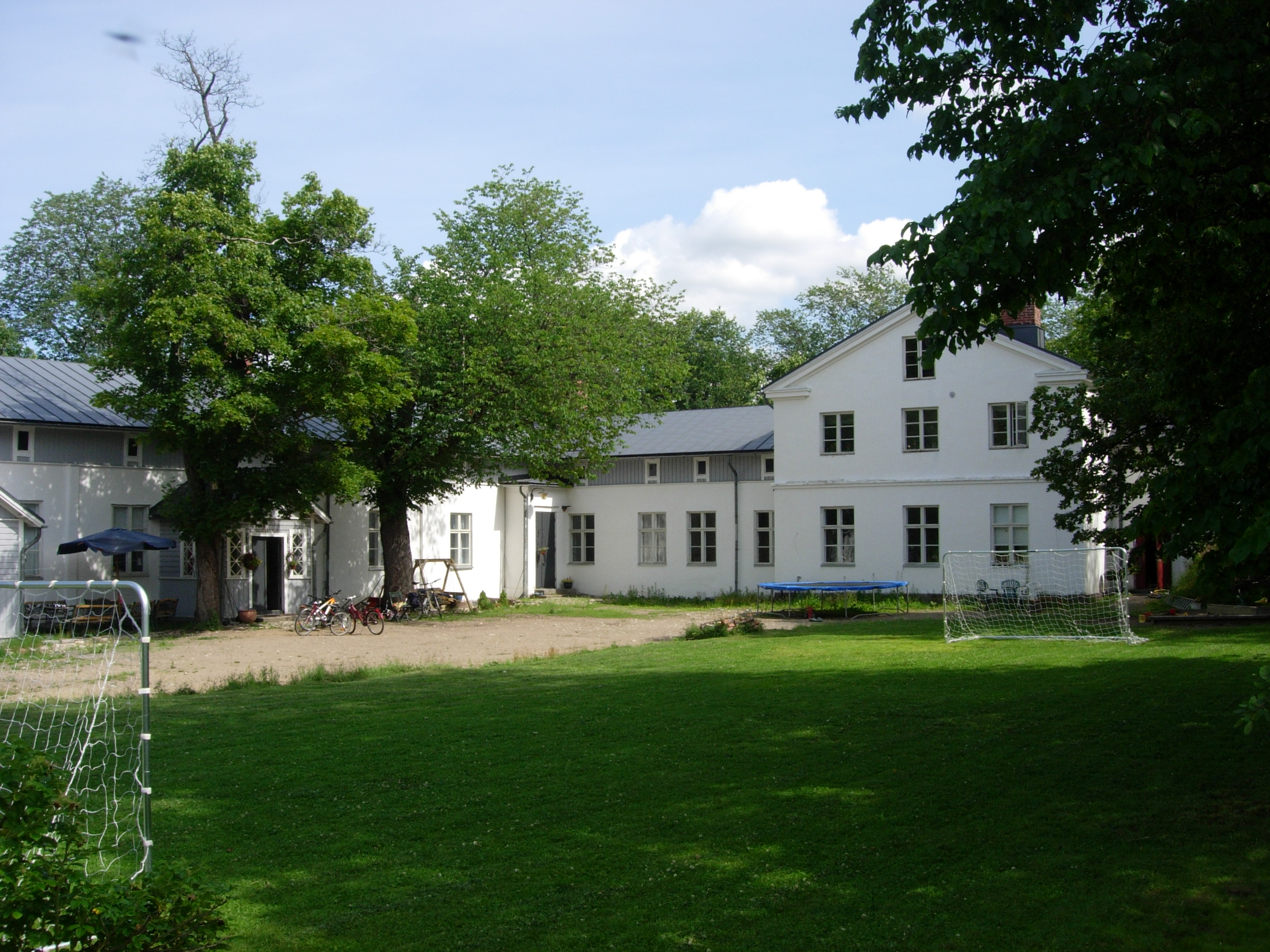 Kärsämäen kartano (Hiiden kartano), Kärsämäki, Turku.